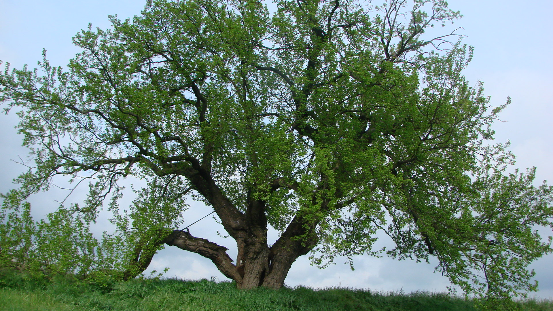 Antico gelso nero (morus nigra)